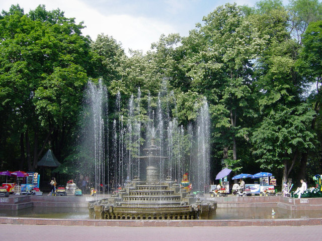 Chisinau, fontein in het stadspark "Stefan cel Mare si Sfint".